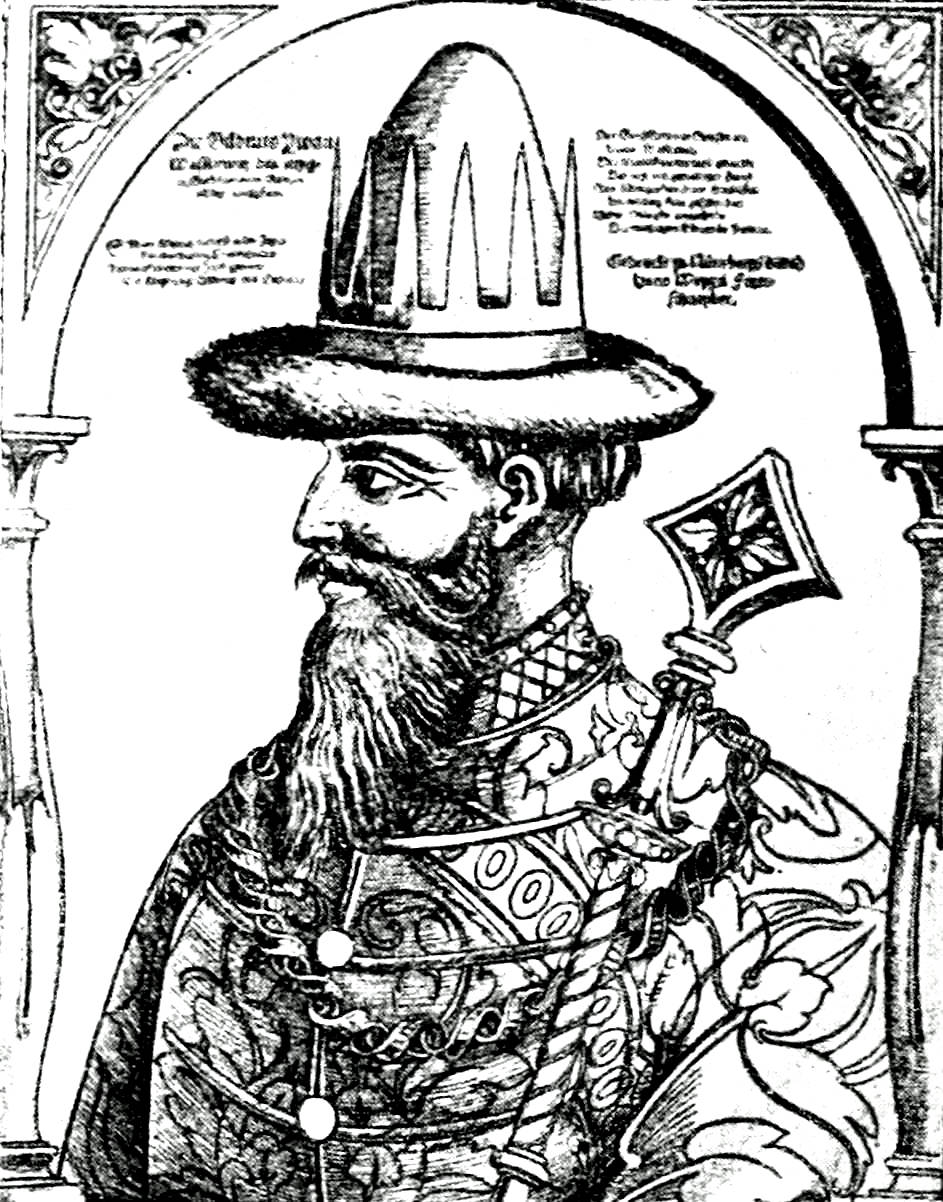 Иоанн IV Васильевич Грозный. (С современного портрета, гравированного в Нюрнберге Г. Вейгелем). Это изображение было использовано для иллюстрирования статьи «Иоанны, Князья и Государи русские» опубликованной в одиннадцатом томе «Военной энциклопедии», который был издан книгоиздательским товариществом И. Д. Сытина в 1913 году в столице Российской империи городе Санкт-Петербурге.